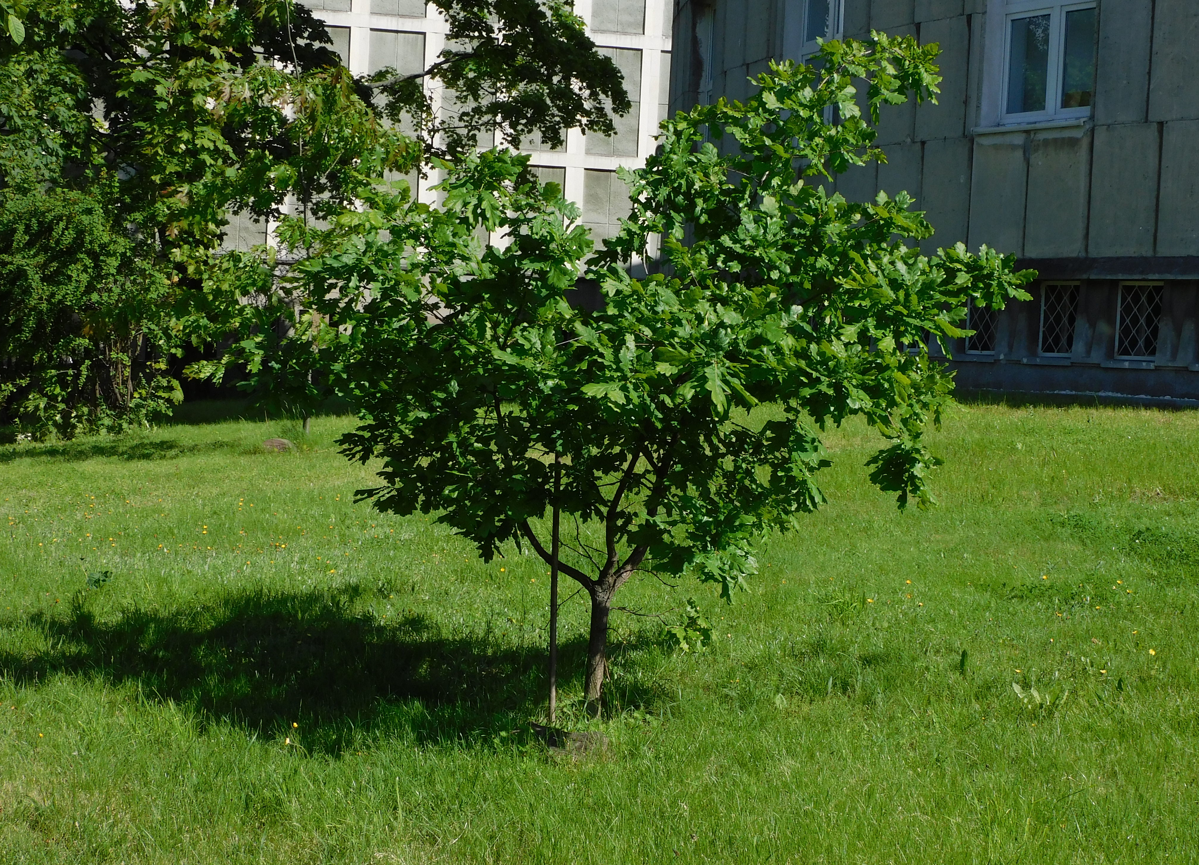 Dąb pamiątkowy Janusz posadzony przed Archiwum Akt Nowych w Warszawie na cześć ofiarodawcy archiwów Janusza Kazimierza Zawodnego.